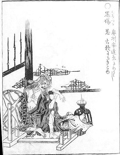 Kurozuka (黒塚) from the Gazu Hyakki Yakō